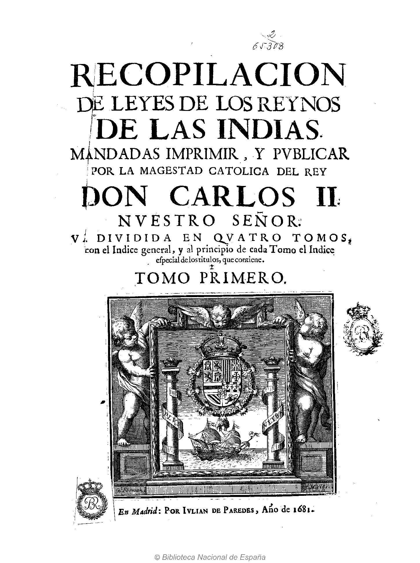 Recopilacion de Leyes de los Reynos de las Indias mandadas imprimir, y publicar por la magestad catolica del rey don Carlos II ... ; va dividida en quatro tomos ... ; tomo primero [quarto] Autores: Paredes, Julián de (fl. 1646-1701) ; Fosman y Medina, Gregorio (fl. 1653-1713) Fecha: 1681 Datos de edición: En Madrid, por Iulian de Paredes